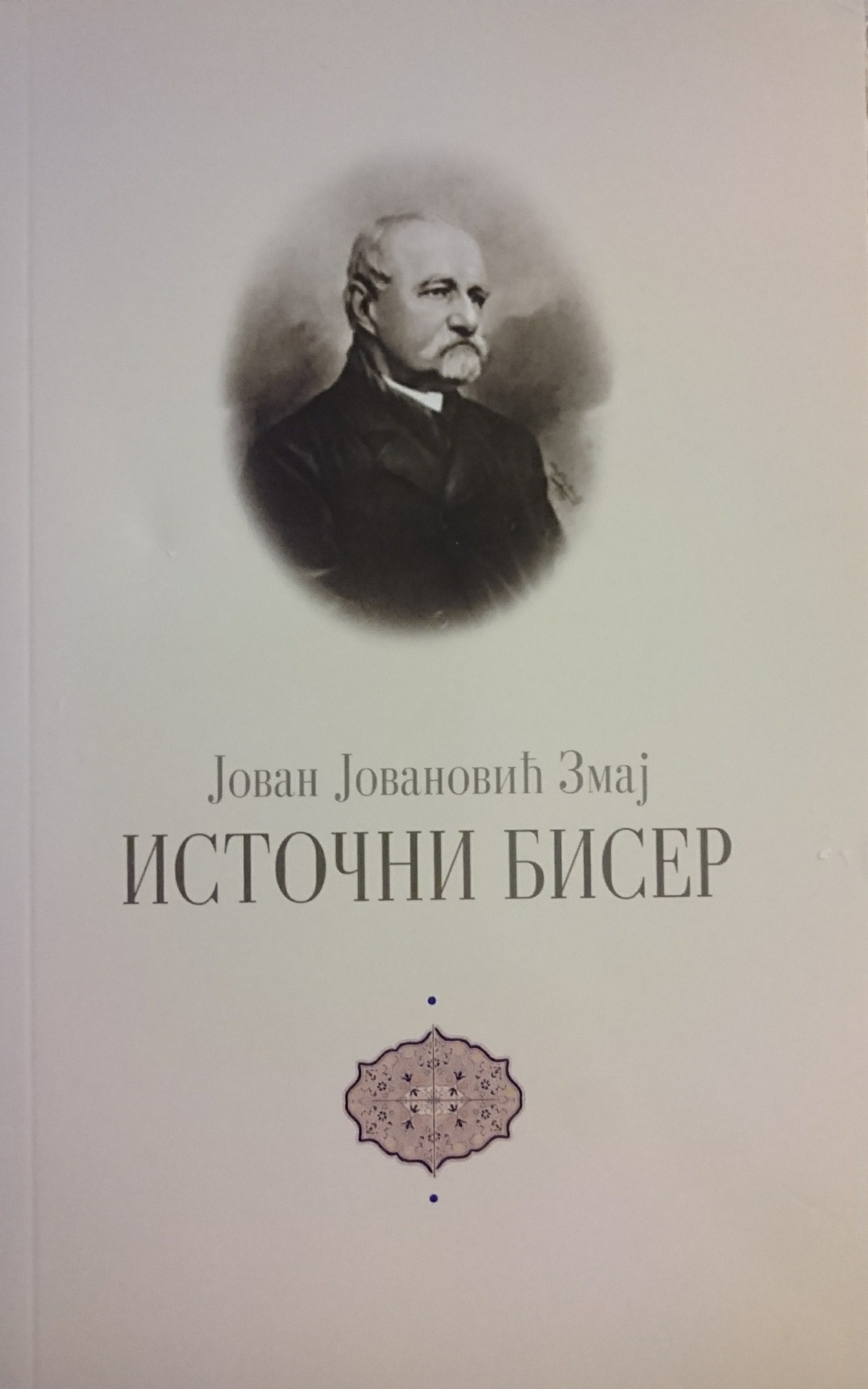 реиздање књиге „Источни бисер“Јована Јовановића Змаја поводом 150 година од првог издања